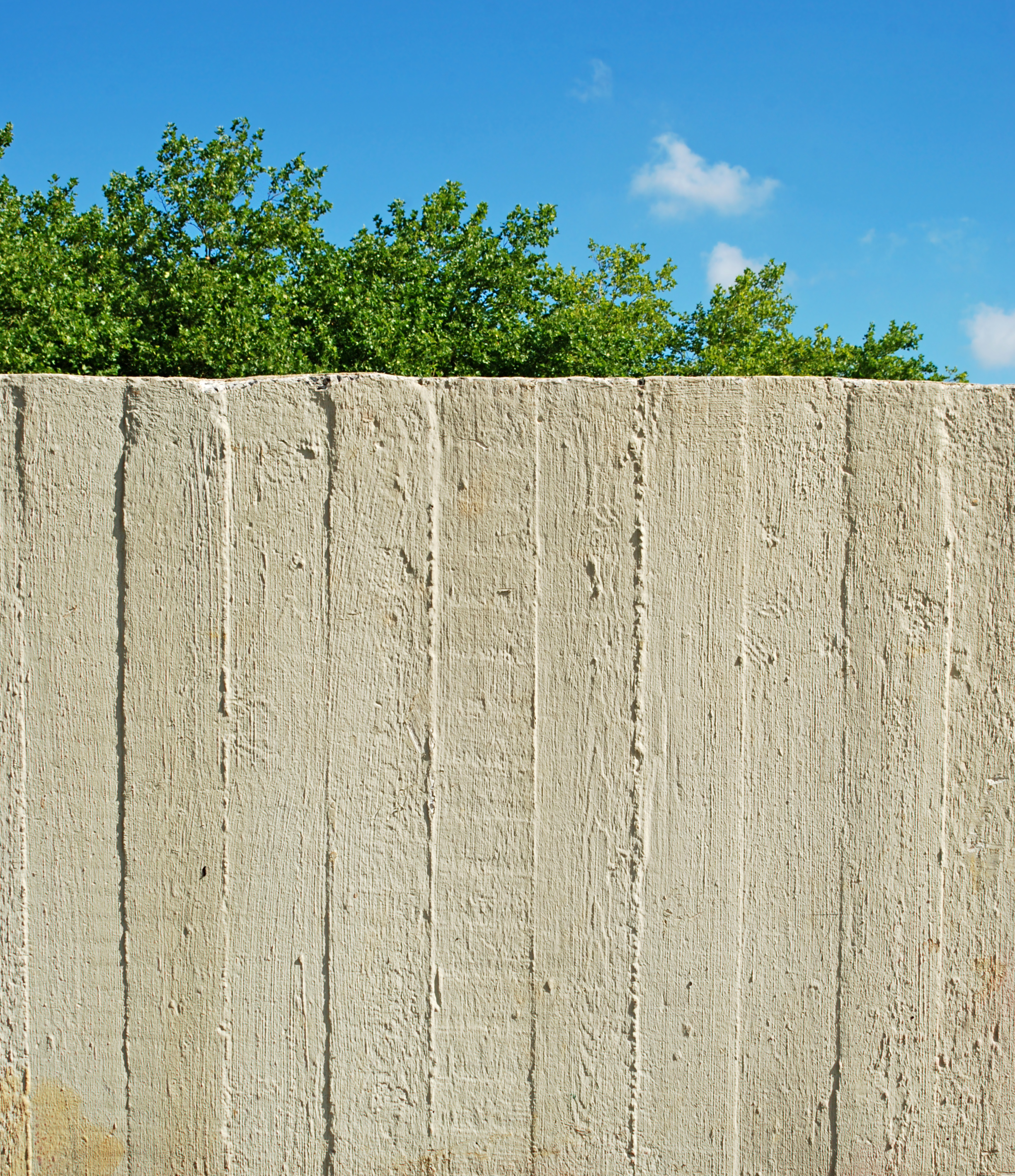 Belgique - Louvain-la-Neuve - Place des Sciences - béton brut aux abords des Auditoires des Sciences This photo of immovable heritage has been taken in the Walloon Region